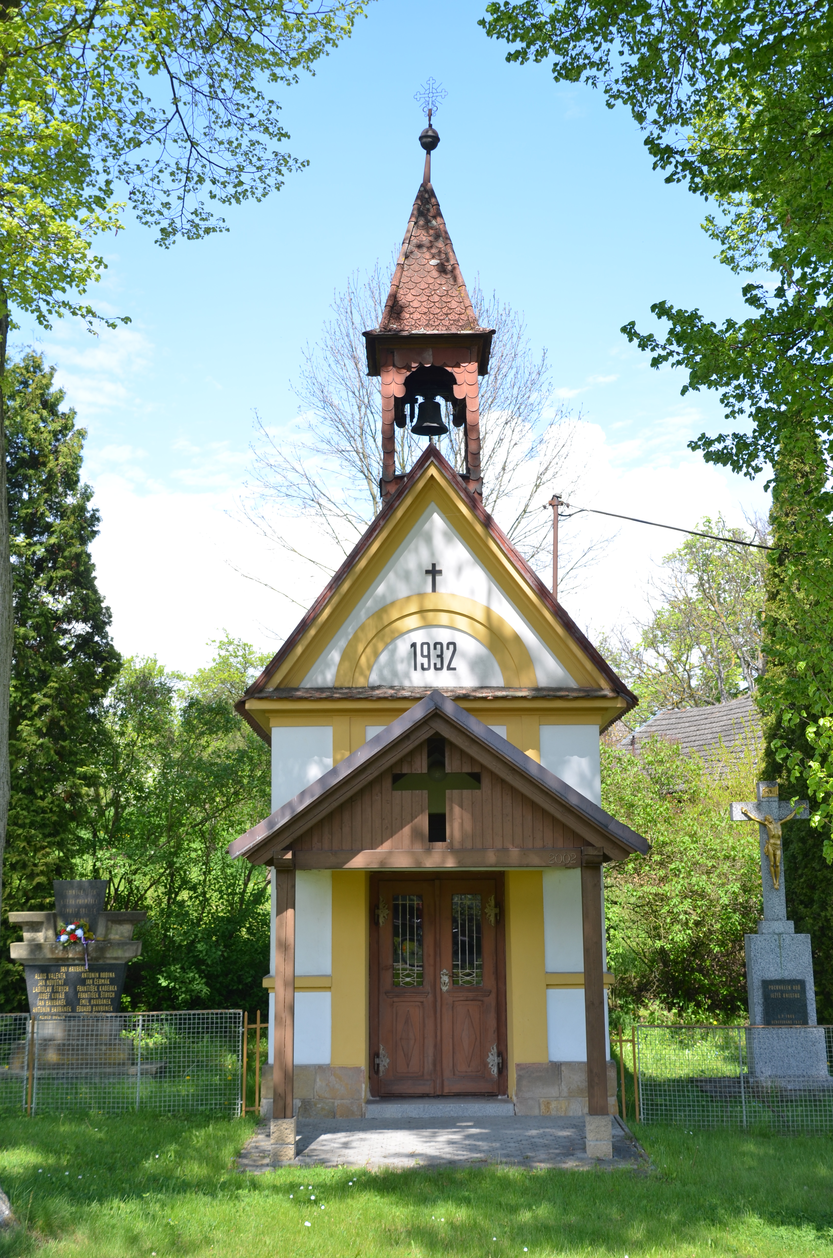 Meziříčko, městská část Letovic